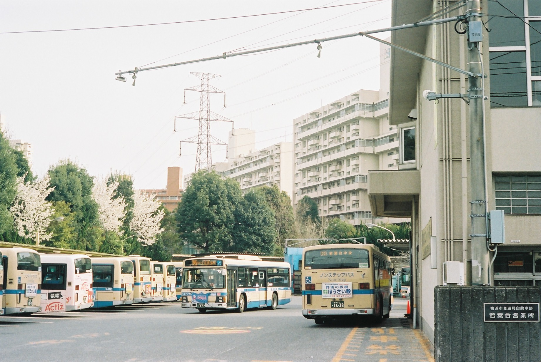 横浜市営バス若葉台営業所、2012年4月10日撮影